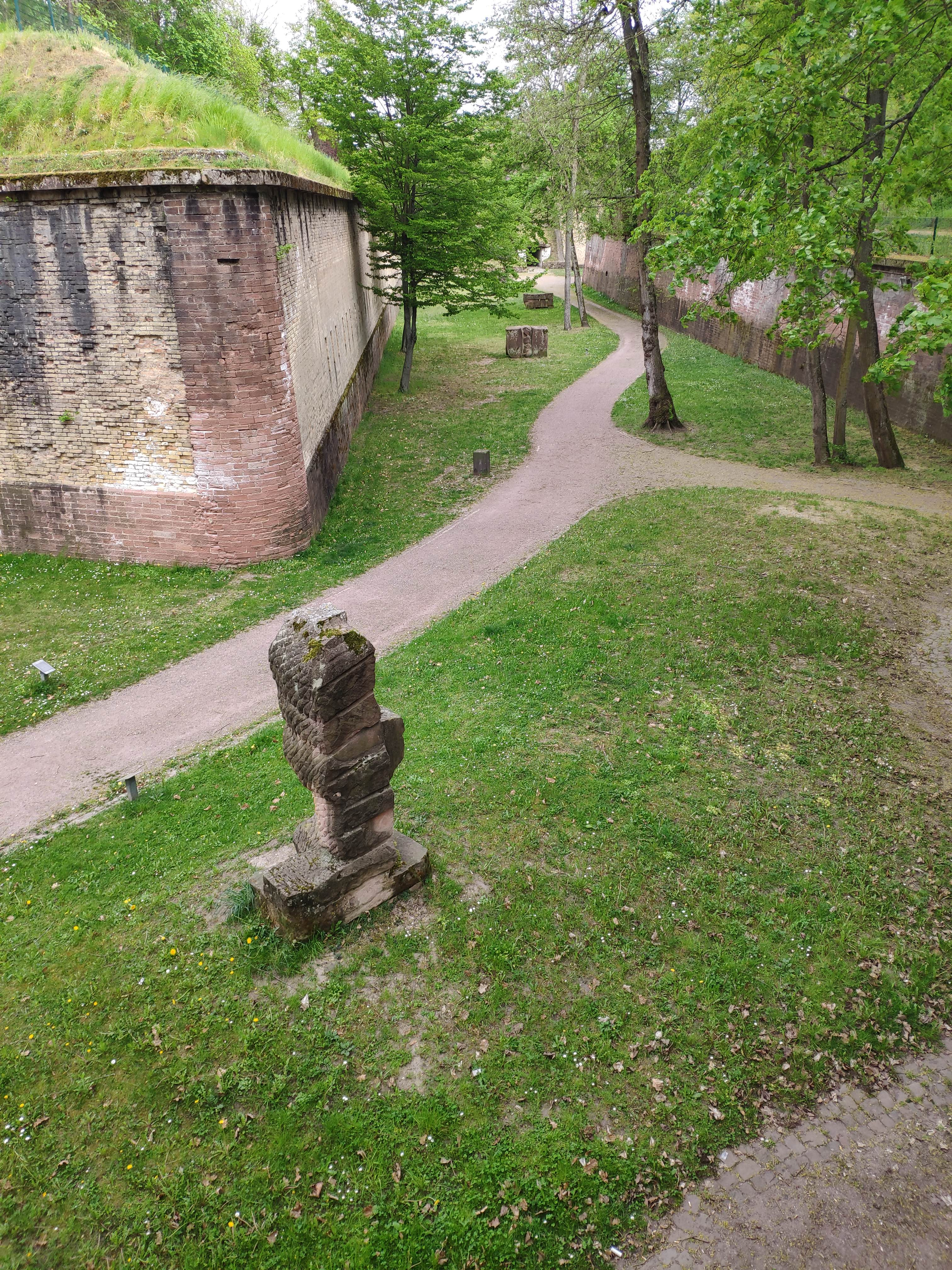 Skulpturenpark Germersheim Überblick Werke 2-4